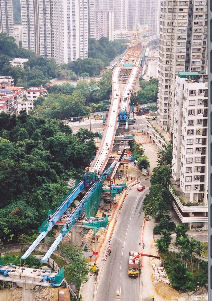 香港沙田2002